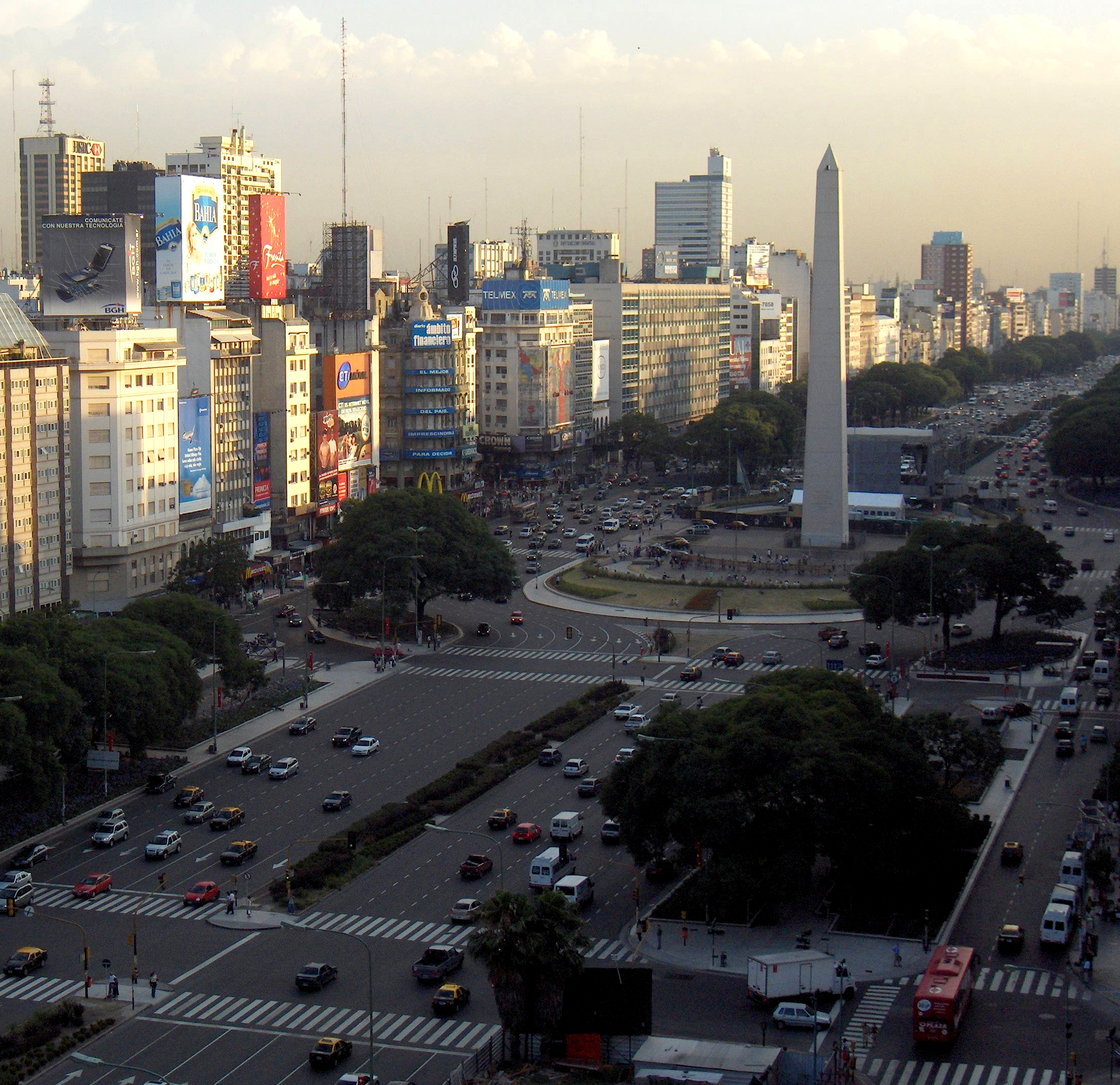 Vista de la Avenida 9 de Julio, en la Ciudad de Buenos Aires.